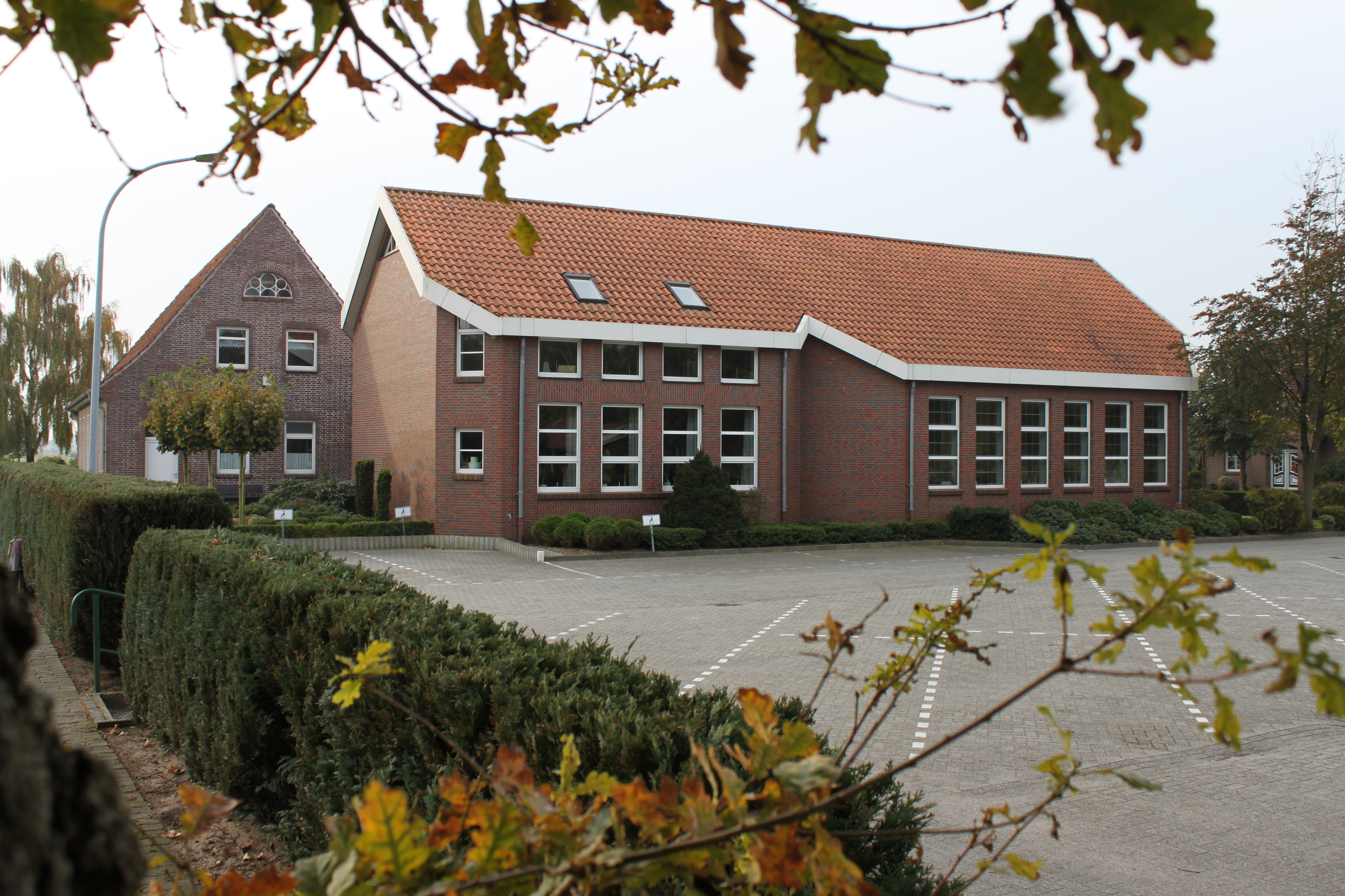 Kirche der Baptisten in Hesel-Firrel